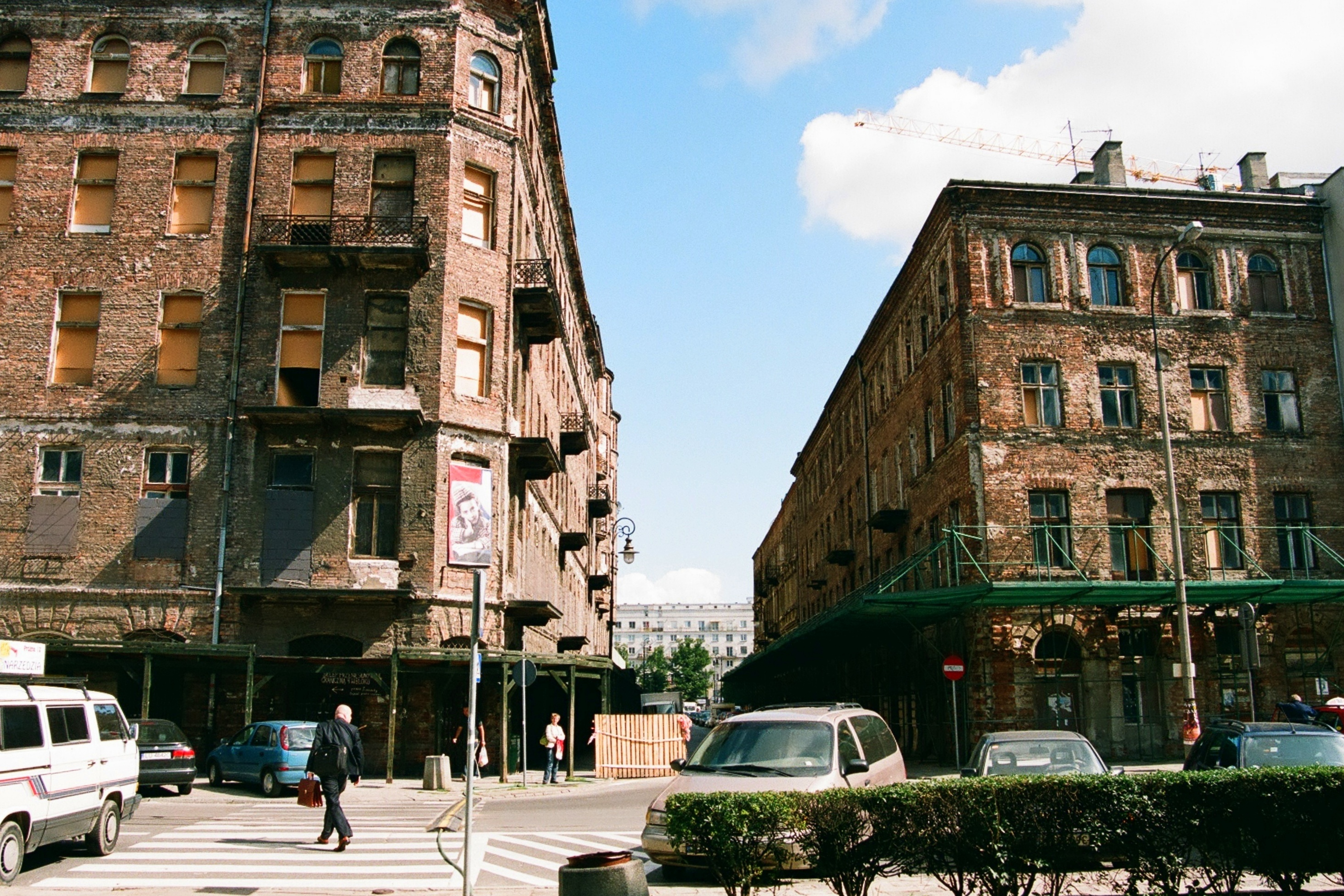 Warszawa, ul. Próżna przed rewitalizacją. Po prawej - kamienica Zalmana Nożyka, po lewej - Majera Wolanowskiego. Foto z 2007